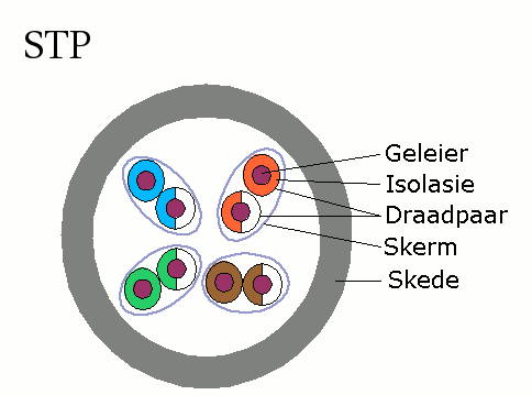 Afgeskermde Gedraaide Draadpaar